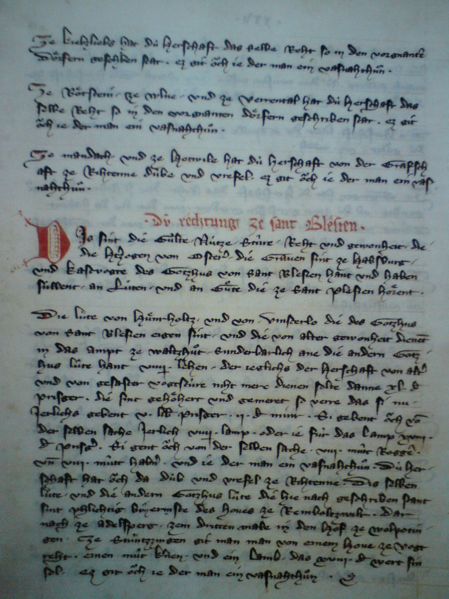 Habsburger Urbar, Badische Landesbibliothek Karlsruhe, (olim F.F. Hofbibliothek Donaueschingen), MS 691. Abschnitt über Sankt Blasien